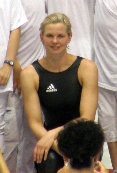 121. DM Schwimmen in Berlin Cropped from File:BrittaSteffen.JPG